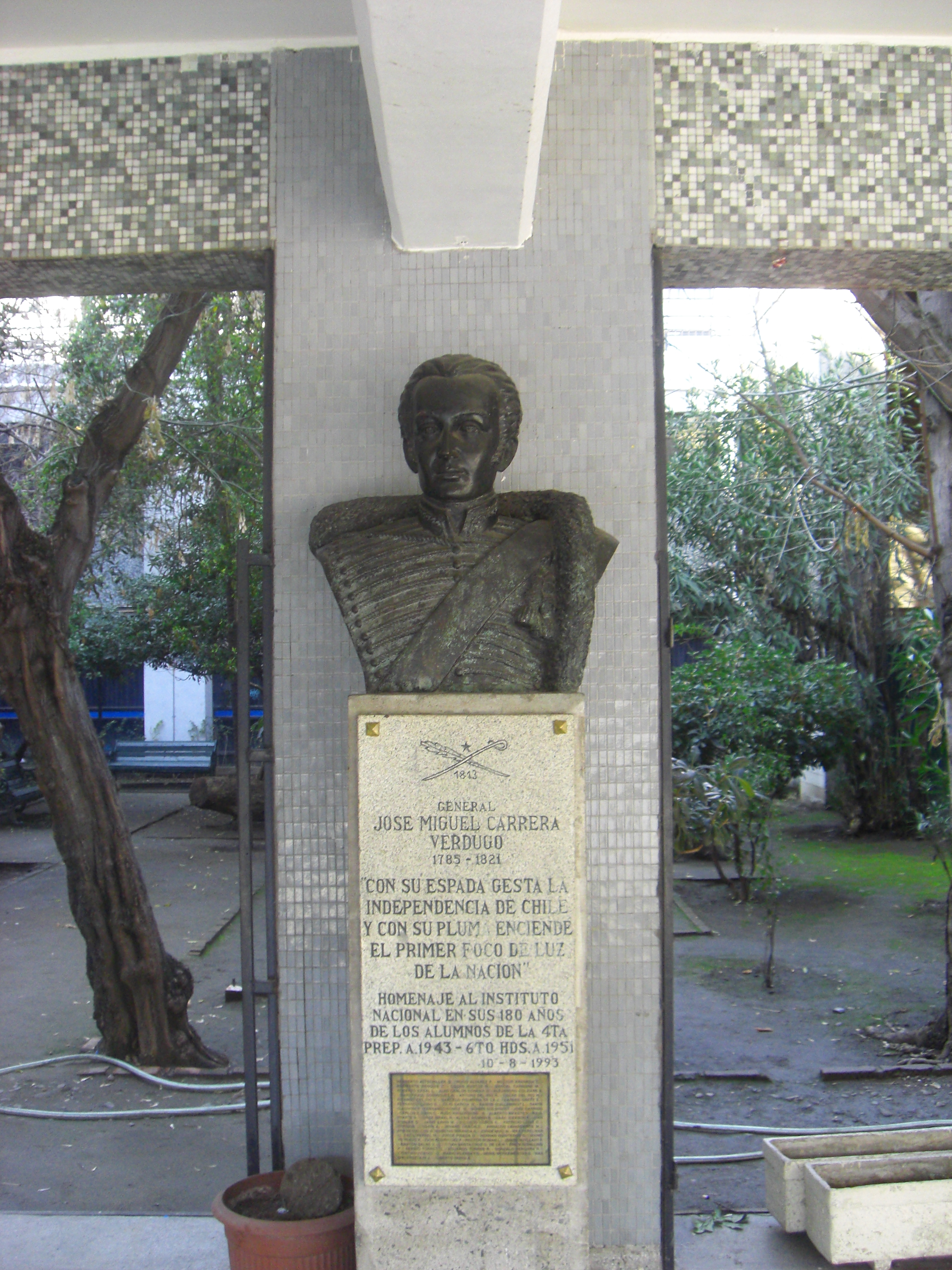 Busto de bronce que representa a don José Miguel Carrera Verdugo, realizado por el escultor Héctor Román L. ubicado en el Instituto Nacional